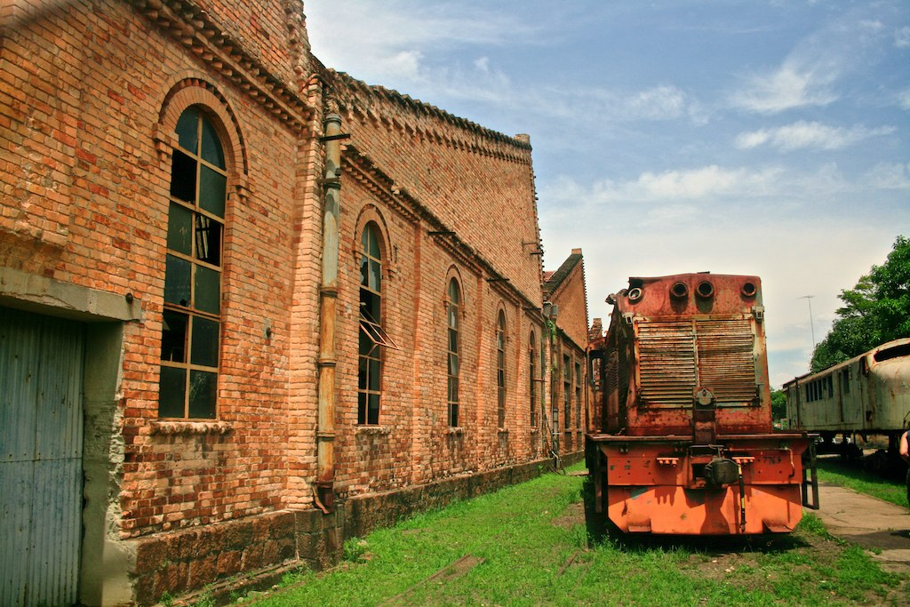 Locomotiva Batida